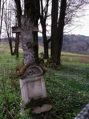 Siegenthal - cmentarz ewangelicki